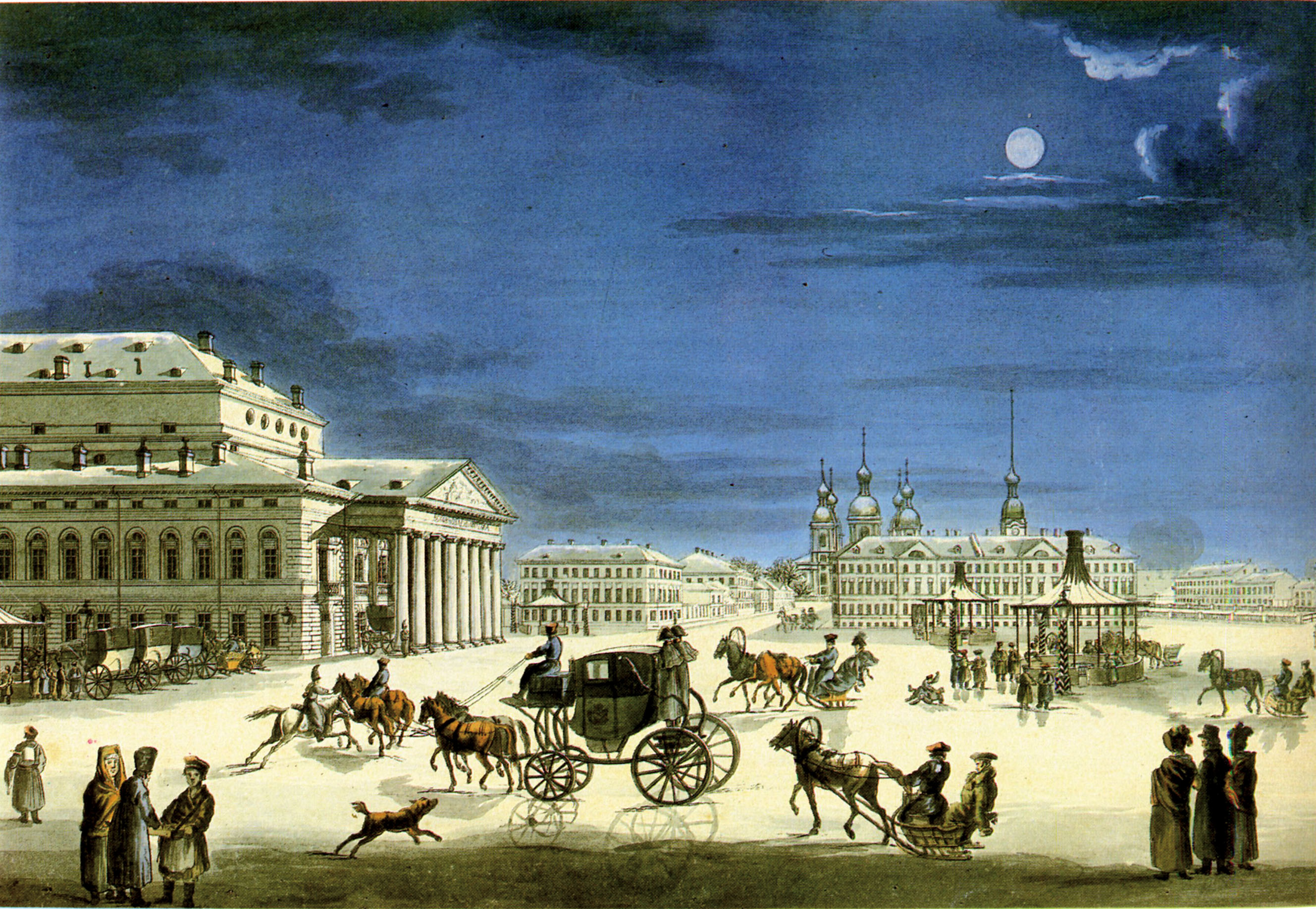 Большой (Каменный) театр. Рисунок неизвестного художника. 1810-е гг. ВМП